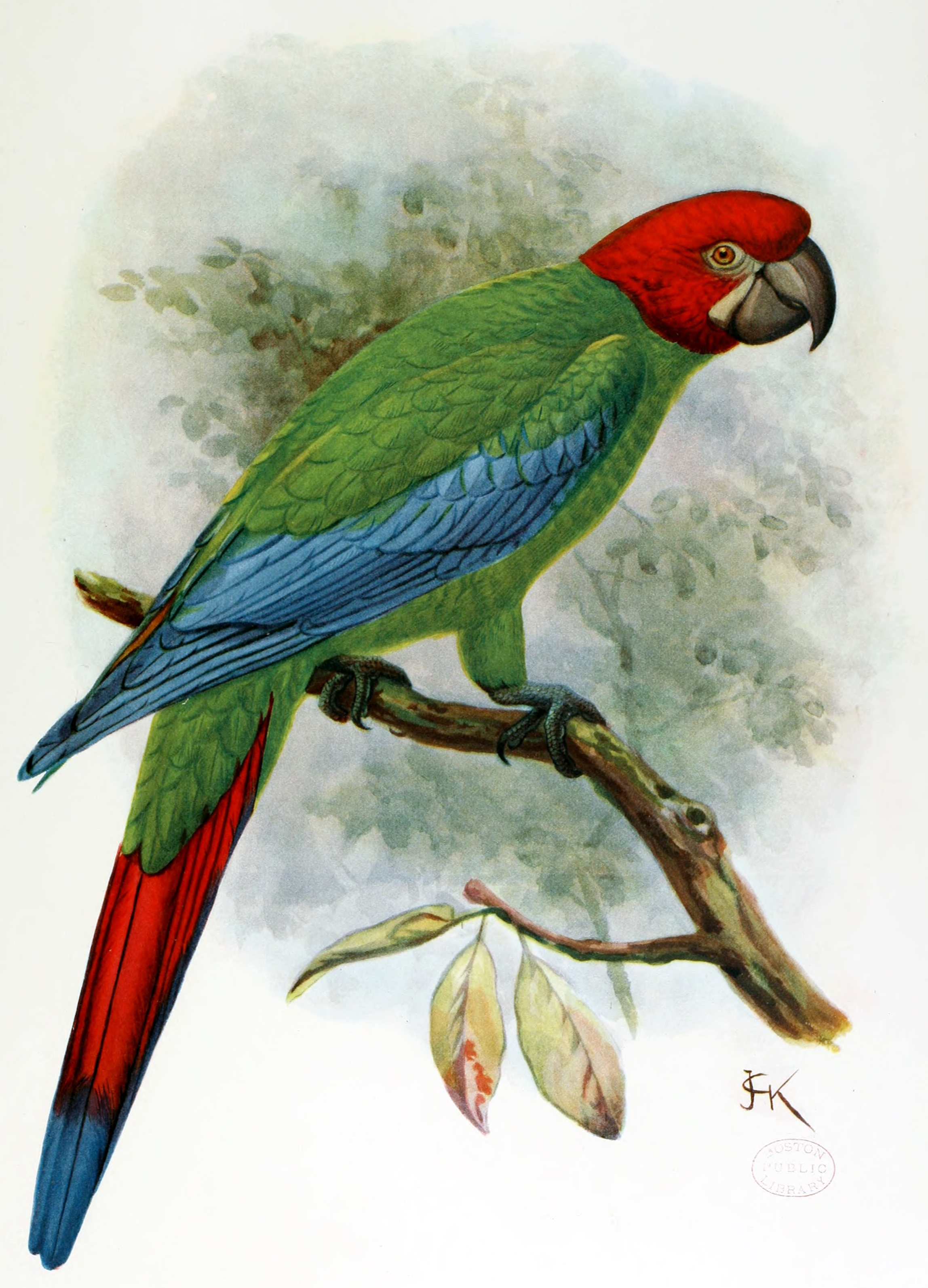 Ara erythrocephala, Rotkopfara